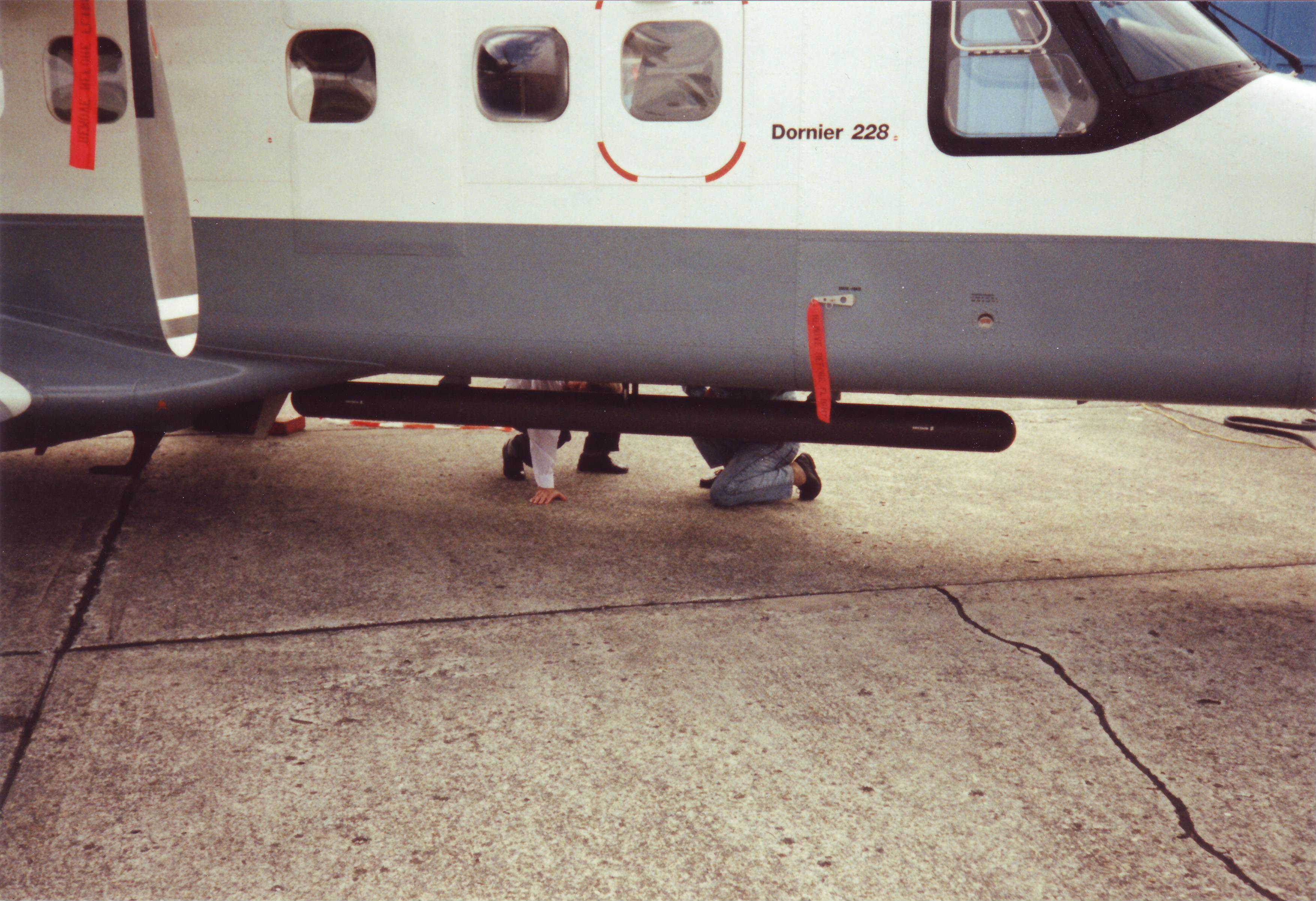 Radarantenne an Oelüberwachungsflugzeug Dornier Do 228 LM